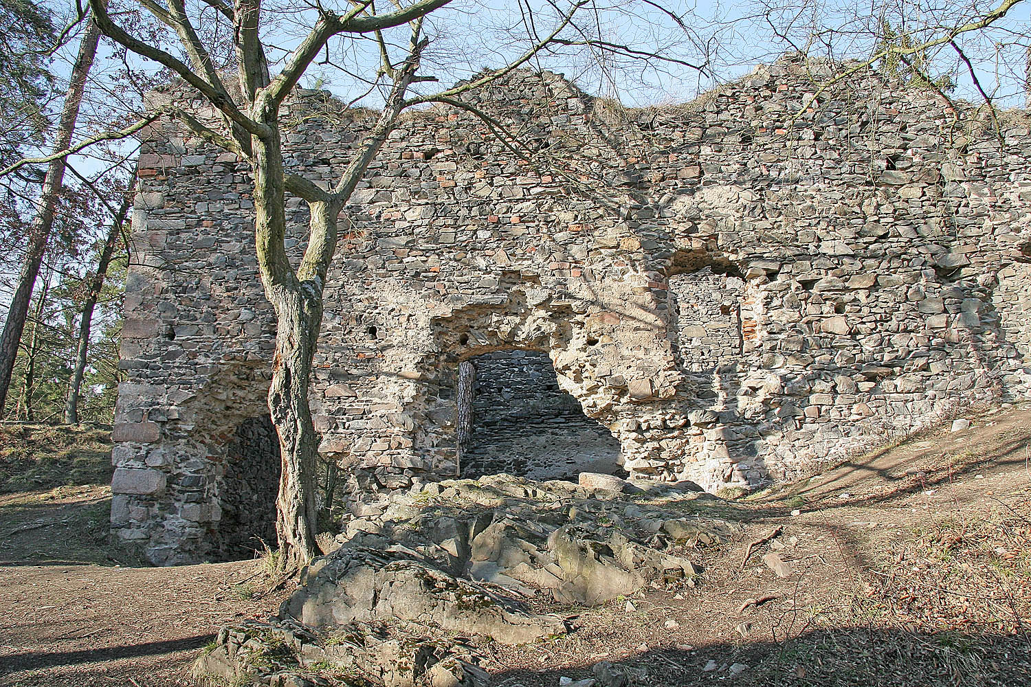 zříceniny nového paláce hradu Zbořený Kostelec